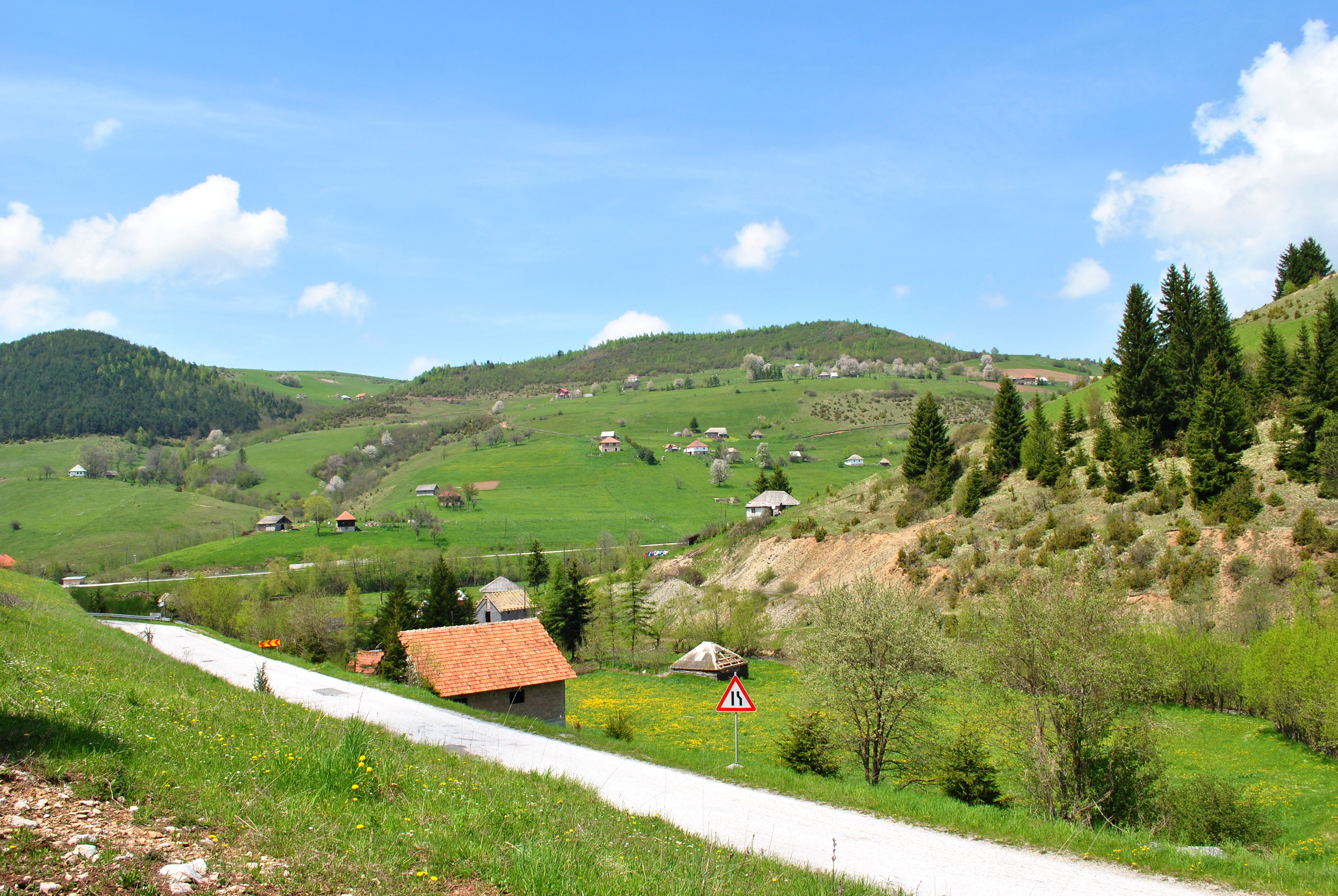 Panorama naselja